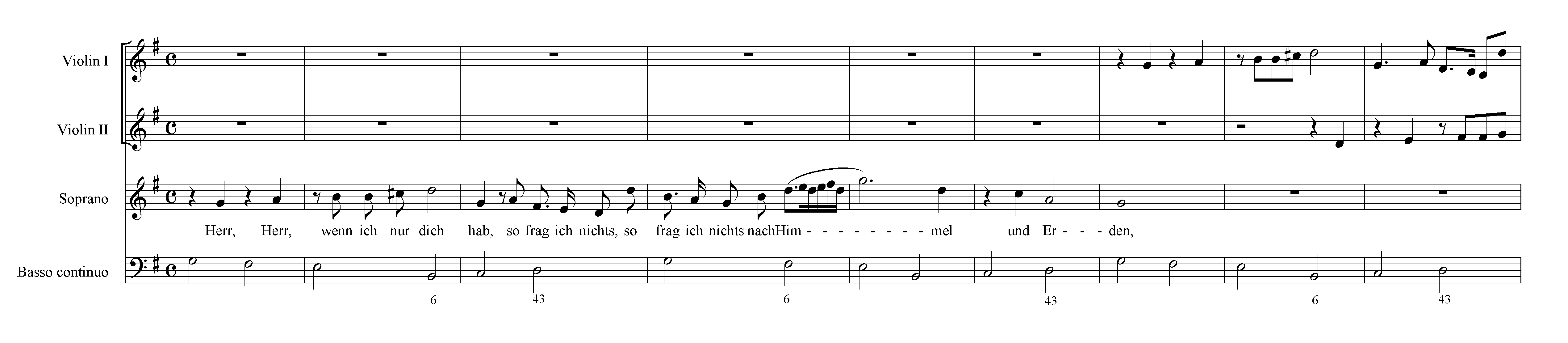 Score of Dietrich Buxtehude' Herr, wenn ich nur dich hab' BuxWV38